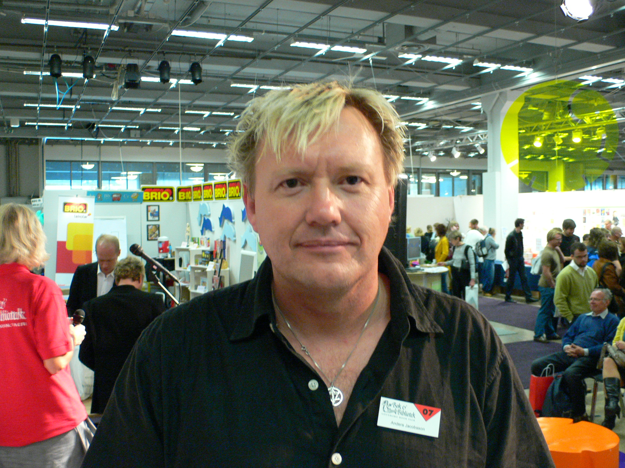 Anders Jacobsson at Gothenburg Book Fair 2007, Anders Jacobsson på Bok- och biblioteksmässan i Göteborg